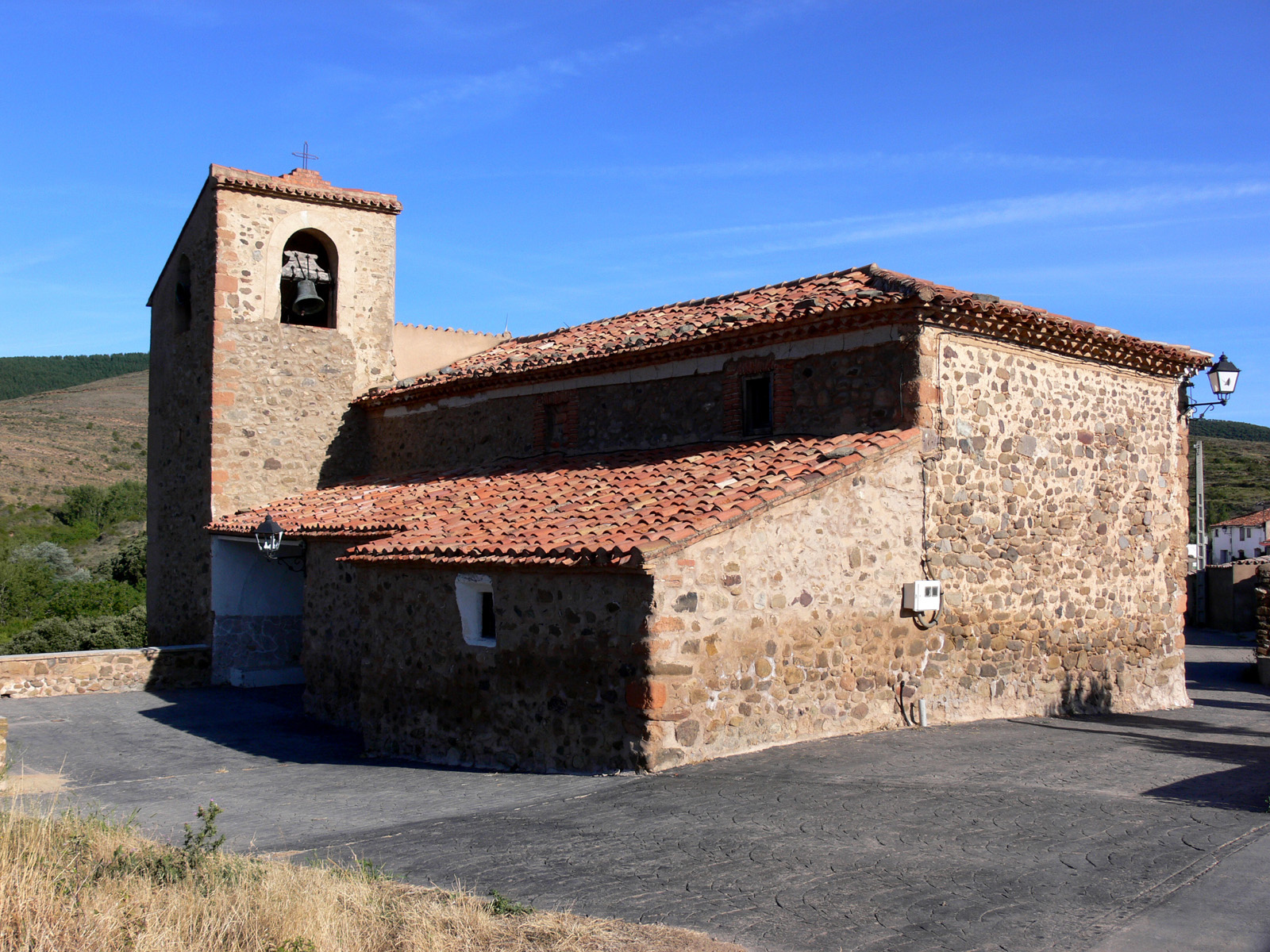 Iglesia de la Magdalena en Bergasillas Somera, localidad de Bergasillas Bajera (La Rioja - España).